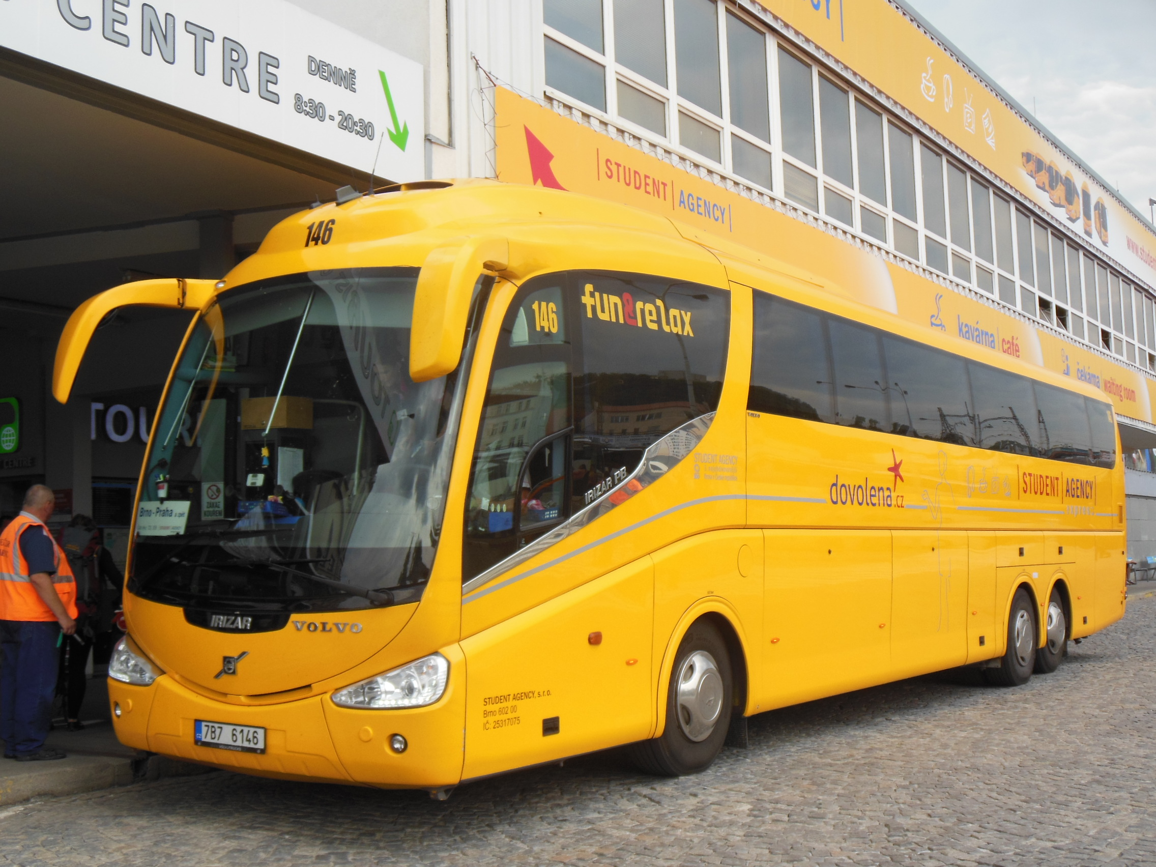 Autobus spol. Student Agency na Ústředním autobusovém nádraží Florenc v Praze.